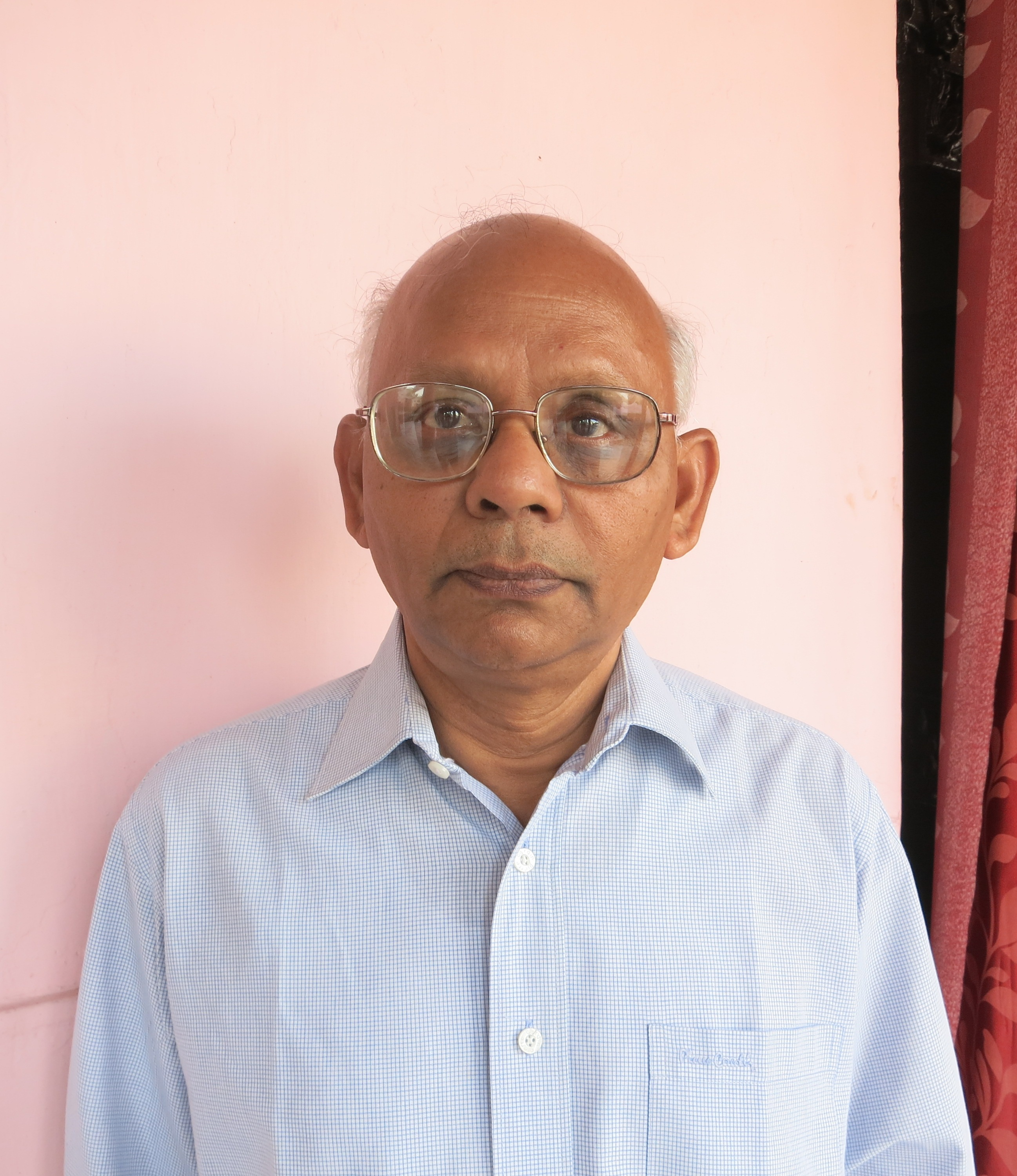 రాయంకుల శేషతల్పశాయి పొనుగుపాడు గ్రామంలో రాయంకుల తాతయ్య,లీలావతి దంపతులకు 1956 అక్టోబరు,11న జన్మించాడు.వరంగల్ రీజనల్ ఇంజనీరింగు కాలేజిలో బి.టెక్. (ఎలిక్ట్రికల్ ఇంజనీరింగ్) చదిని తొలుత స్టేట్ బ్యాంకు ఆఫ్ ఇండియాలో ప్రొబేషనరీ ఆపీసరుగా చేరాడు.ఉద్యోగం విరమించుకొని బెంగుళూరు ఐ.ఐ.యమ్. యూనివర్శిటీ నందు పి.జి.డి.యమ్.కోర్సు పూర్తి చేసాడు. డిల్లీ యూనివర్శిటీలో యల్.యల్.బి. పూర్తి చేసి ‘లా’ పట్టా పొందాడు. ఆ తరువాత యన్.టి.పి.సి. పవర్ గ్రిడ్, ఢిల్లీ మెట్రో ప్రాజెక్టు మొదలైన సంస్థలలో వివిధ కీలక, ఉన్నత పదవుల పనిచేసాడు. తరువాత ఉత్తరాఖండ్ రాష్ట్రంలోని రిషికేష్ నందుగల “తెహ్రీ” హైడ్రో డెవలప్మెంట్ కార్పోరేషన్ ఇండియా లిమిటెడ్ నందు ఫైనాన్స్ డైరెక్టరుగా చేరి ది.05.05.2005 నుండి ది.07.03.2007 వరకు పనిచేసాడు.అదే “తెహ్రీ” హైడ్రో డెవలప్మెంట్ కార్పోరేషన్ ఇండియా లిమిటెడ్ చైర్మెన్, మేనేజింగు డైరెక్టరుగా ది.08.03.2007న బాధ్యతలు స్వీకరించి ఆ పదవిలో ఇతను 2016 నవంబరు 30 వరకు పనిచేసి పదవీ విరమణ పొందాడు.